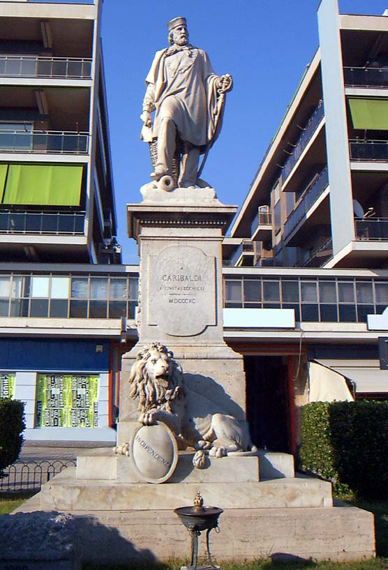 Statua di Giuseppe Garibaldi a Civitavecchia (RM) (1899).